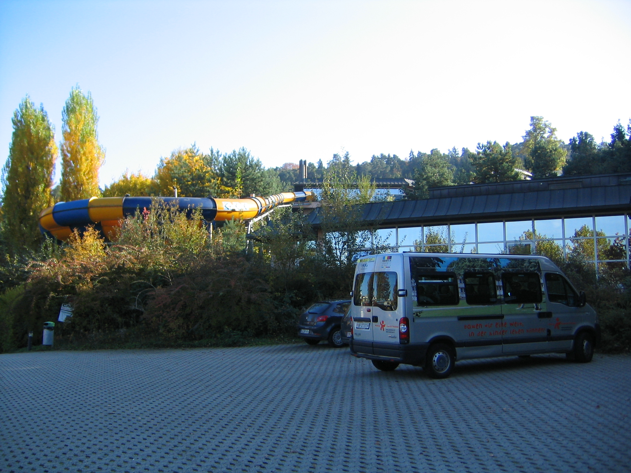 Blick auf eine Rutsche des Alpamare vom Busparkplatz aus